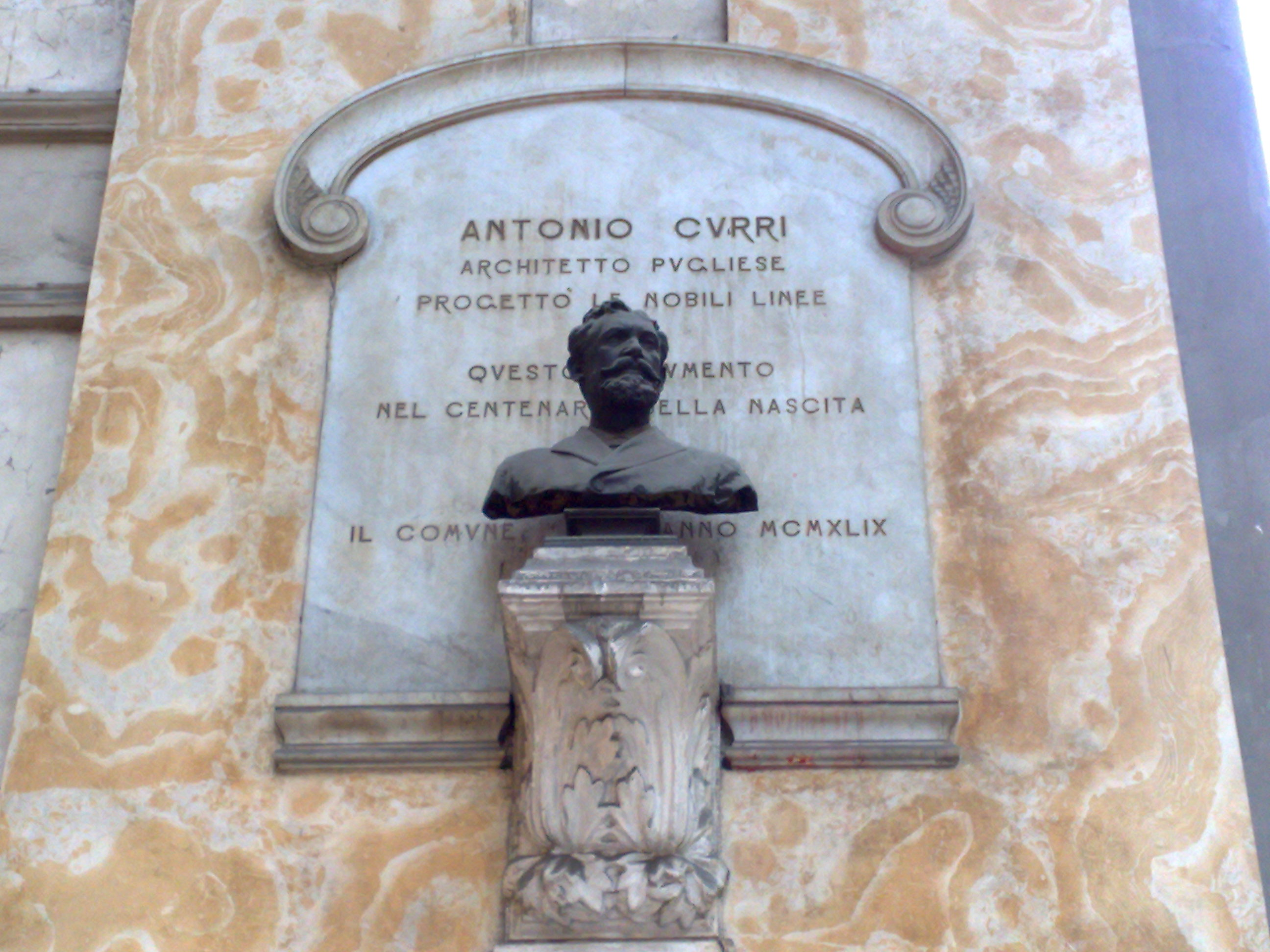 Targa posta dentro la Galleria Umberto I di Napoli dedicata all'architetto Antonio Curri.